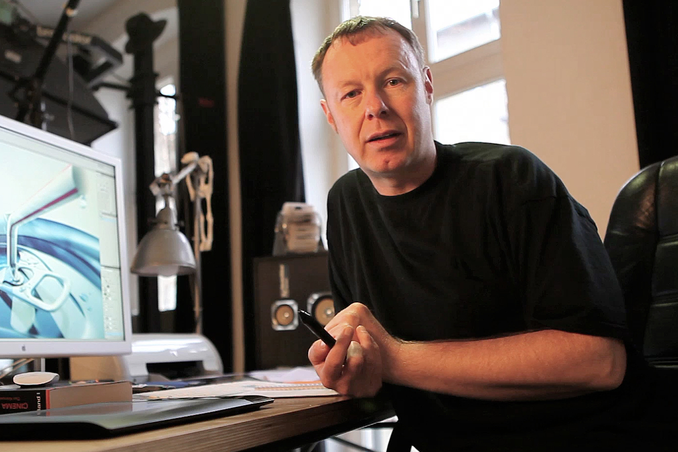 Uli Staiger